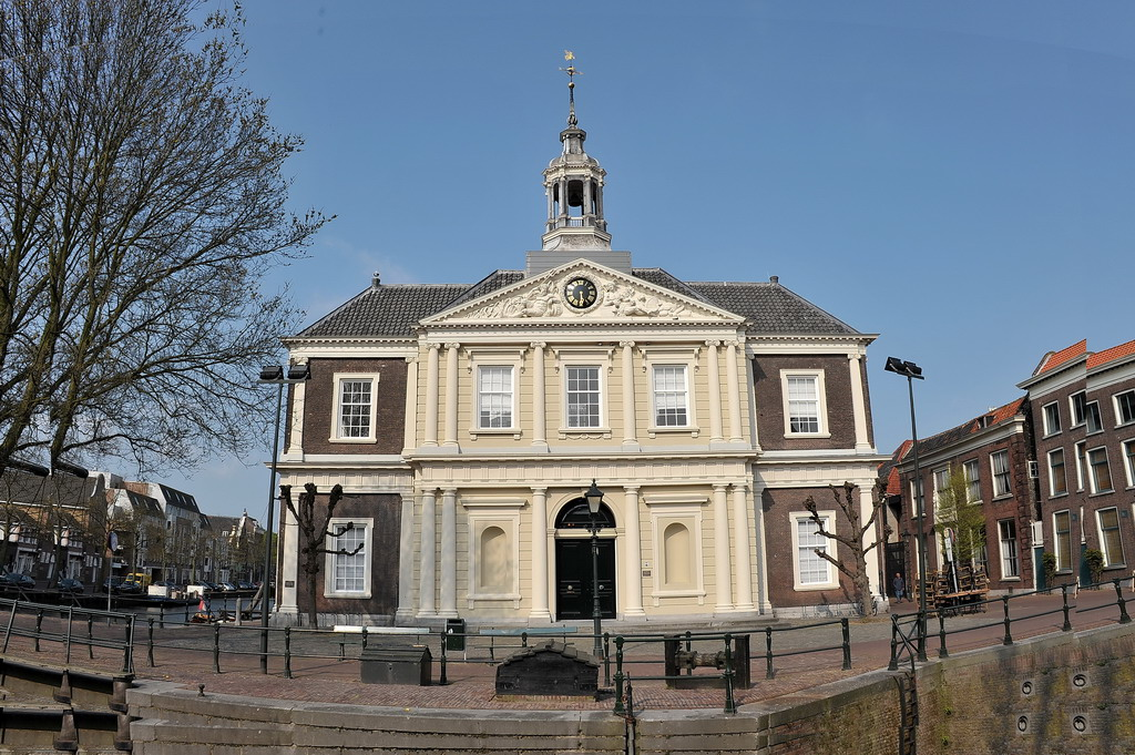 Deze voormalige koopmansbeurs, één van de pronkstukken uit de Schiedams jeneverindustrie, is meer dan 200 jaar oud. De bouw start in 1787 onder leiding van de Rotterdamse architect Carlo Giovanni Giudici en Rutger van Bol’es. Ruim 125 jaar blijft De Korenbeurs in gebruik als handelscentrum. Door de opkomst van de spiritusalcohol, die de moutwijn en granen overbodig maakt moet De Korenbeurs in 1918 haar deuren sluiten.